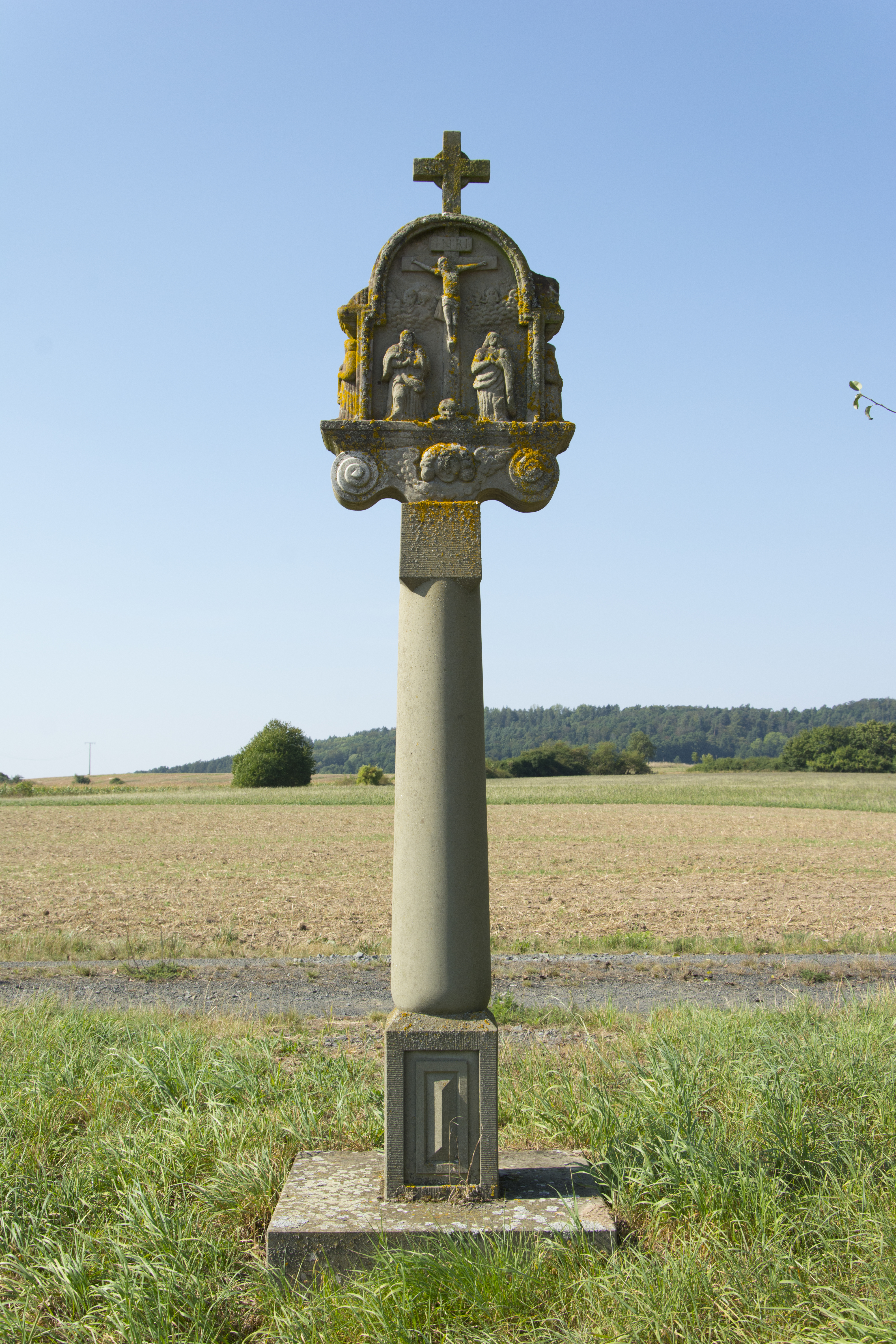 Bildstock, sogenanntes PestmarterlThis is a photograph of an architectural monument.